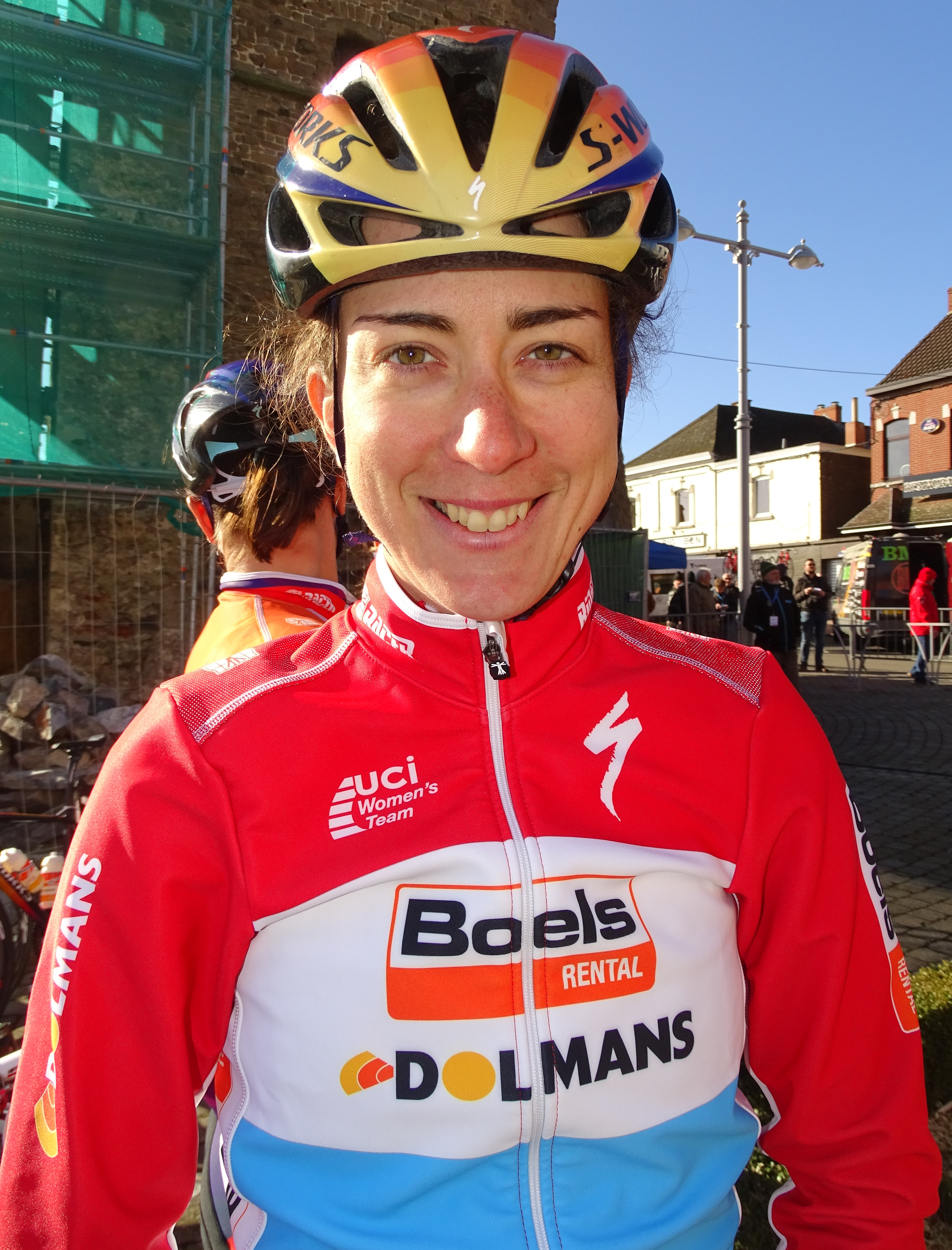 Reportage réalisé le mercredi 2 mars à l'occasion du départ du Samyn des Dames 2016 et du Samyn 2016 à Quaregnon, Belgique.